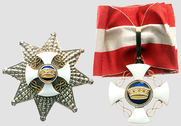 Verdienstorden der Krone Italiens. Komturkreuz und Bruststern 1.Klasse. Kreuz, Gold, emailliert, an kurzem Halsbandabschnitt. Bruststern 1.Klasse, Silber, vergoldet und emailliert, rs. Nadel und Herstellermedaillon Cravanzola Rom.